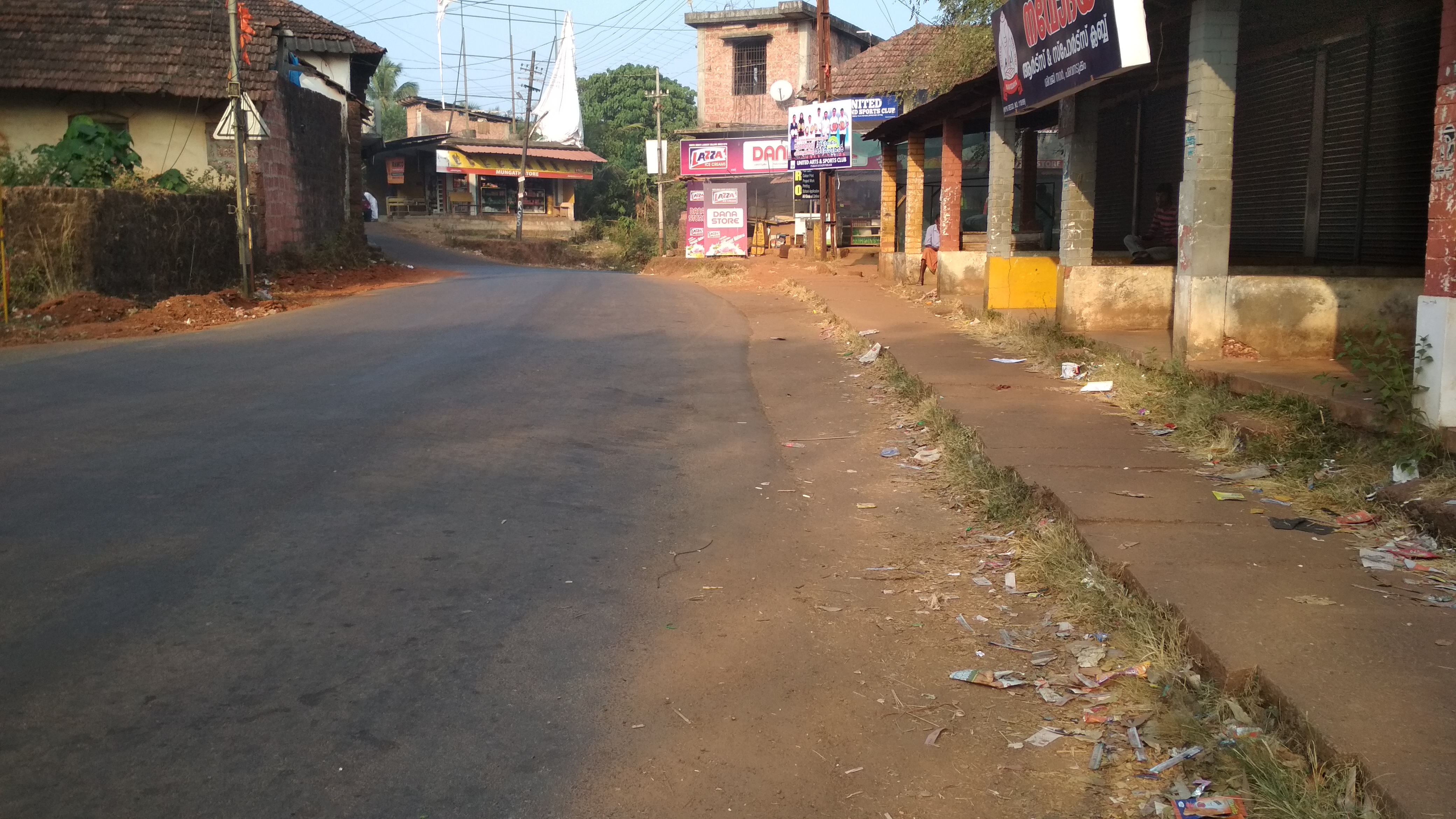 village